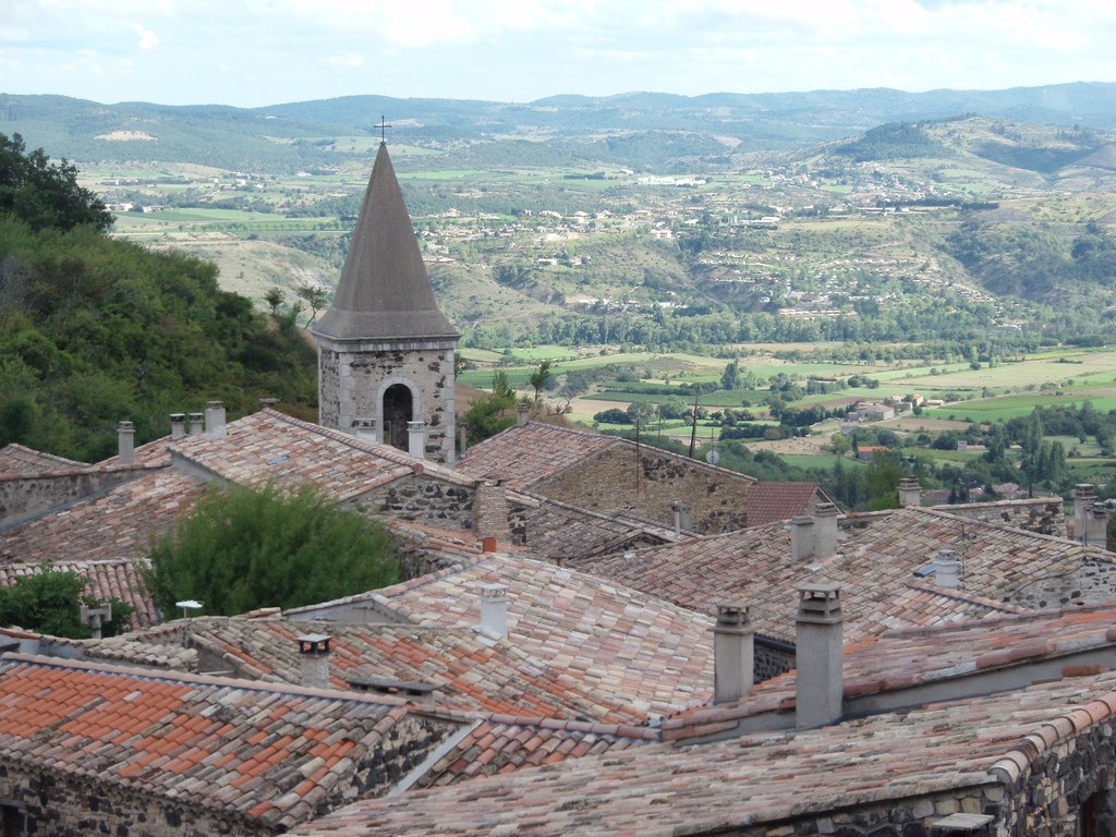 Le village de Mirabel